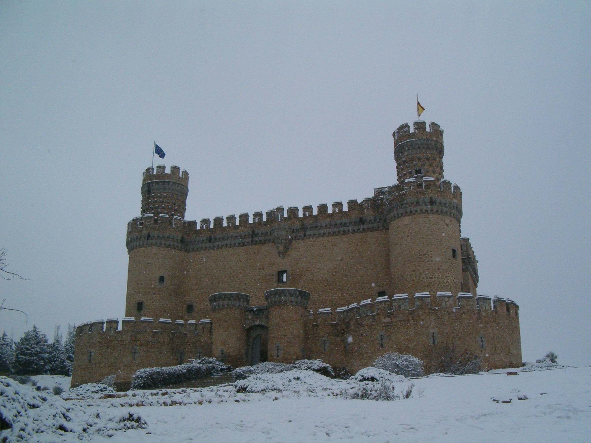 Castillo de Manzanares el Real